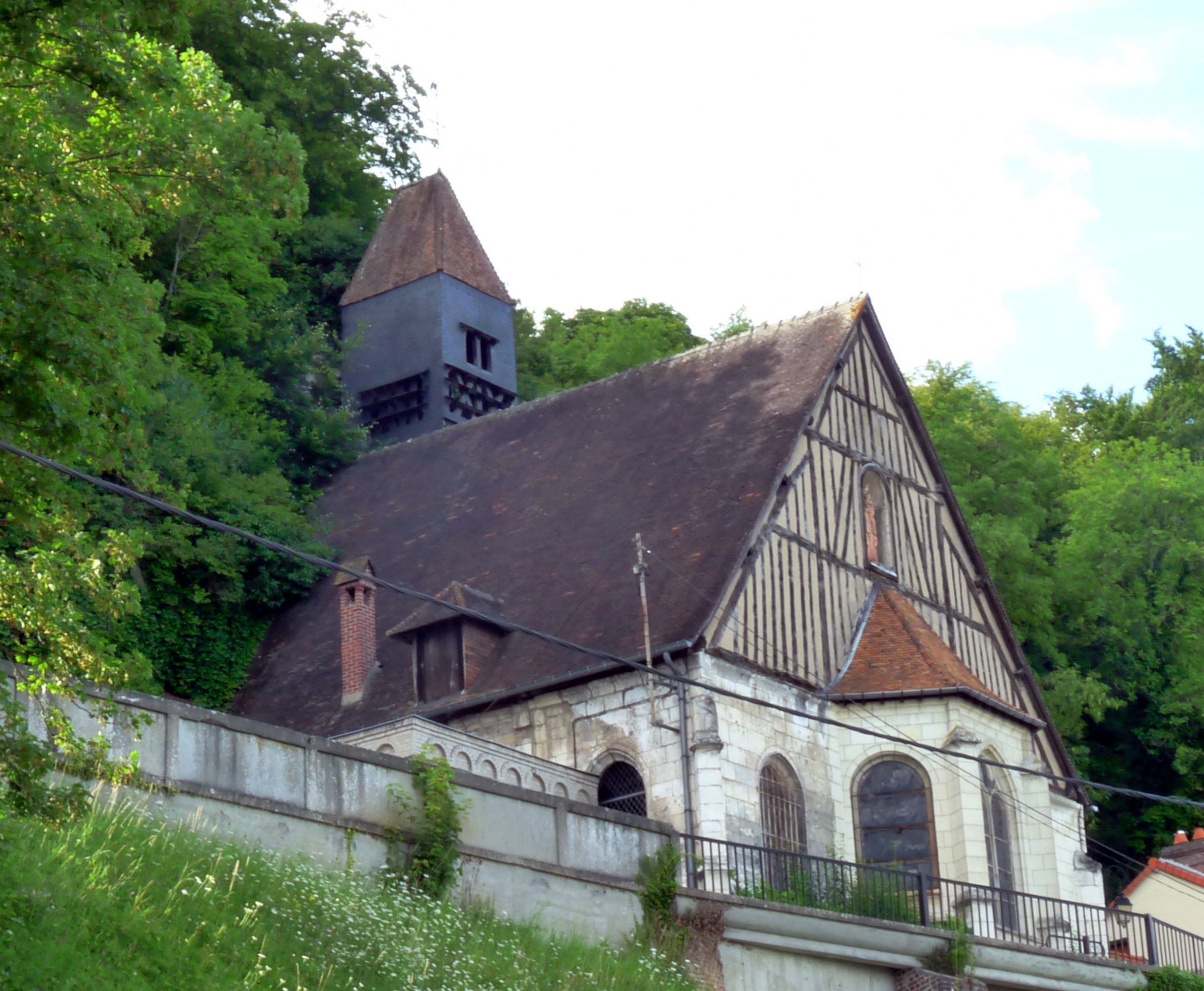 Église Saint-Georges d'Orival.